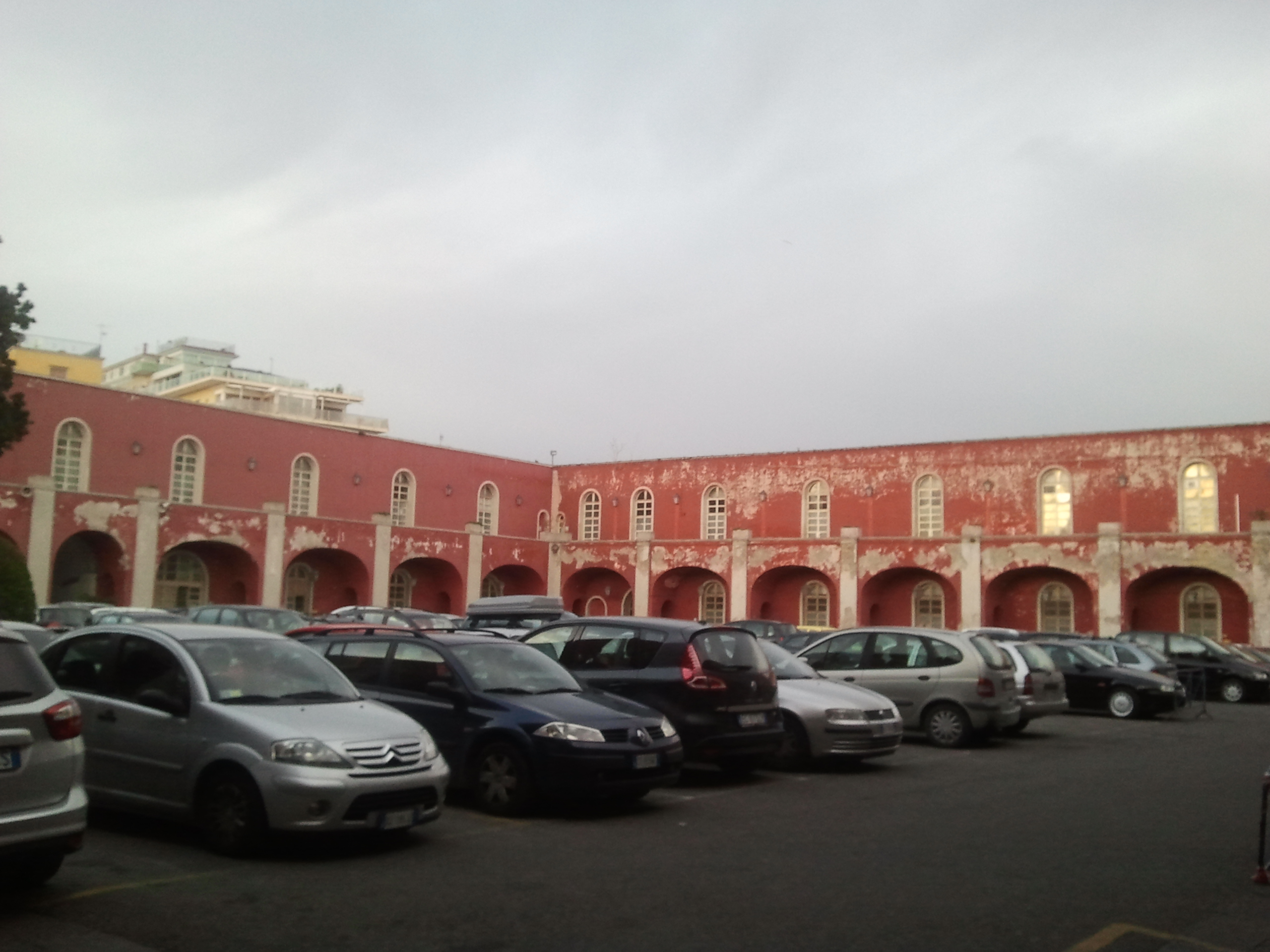 Cortile del Gran Quartiere di Pizzofalcone, oggi sede del IV Reparto mobile di Napoli